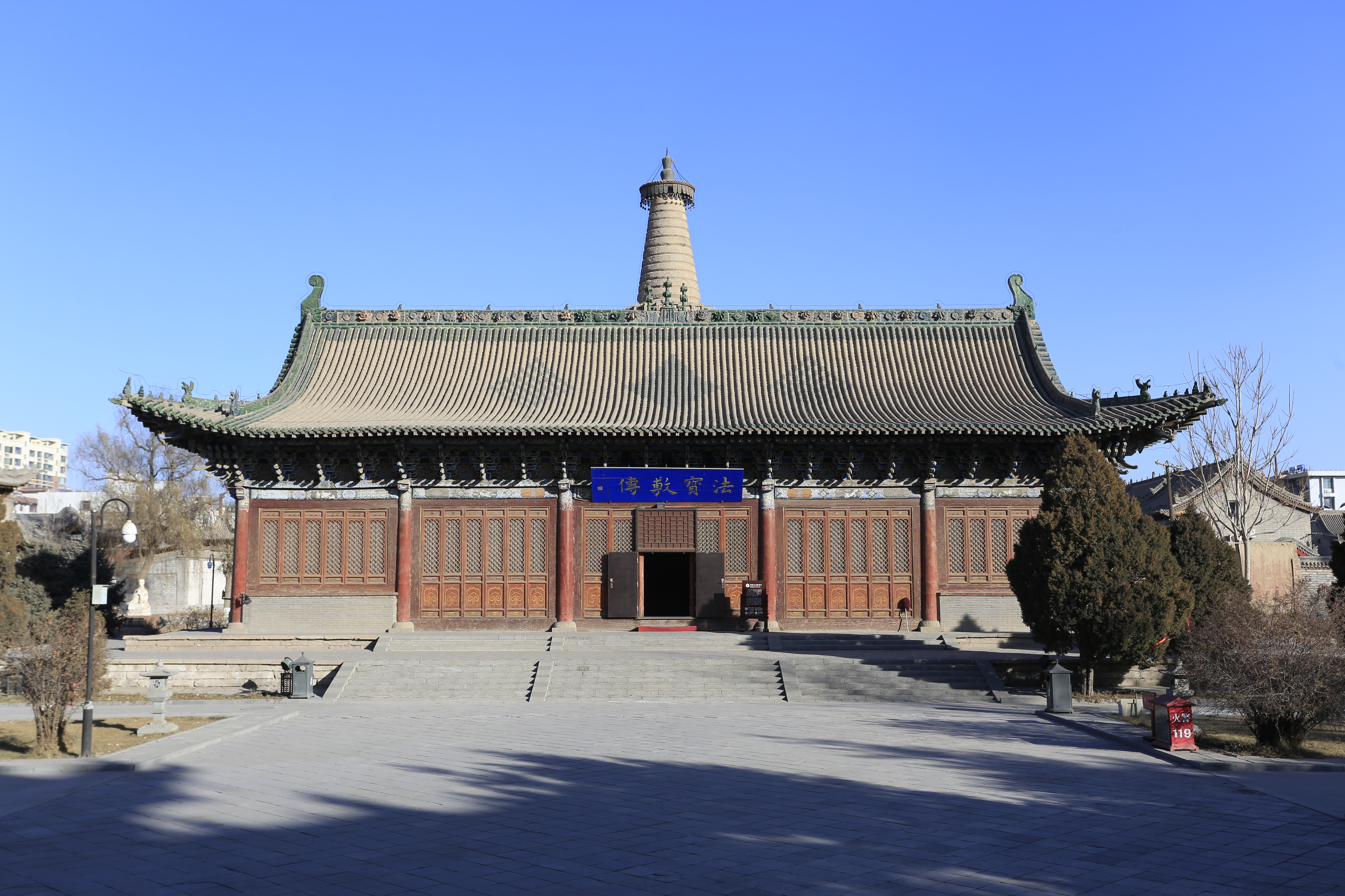 张掖大佛寺—— 原万圣殿旧址，后迁文庙大成殿于此，现为佛教艺术精品陈列厅